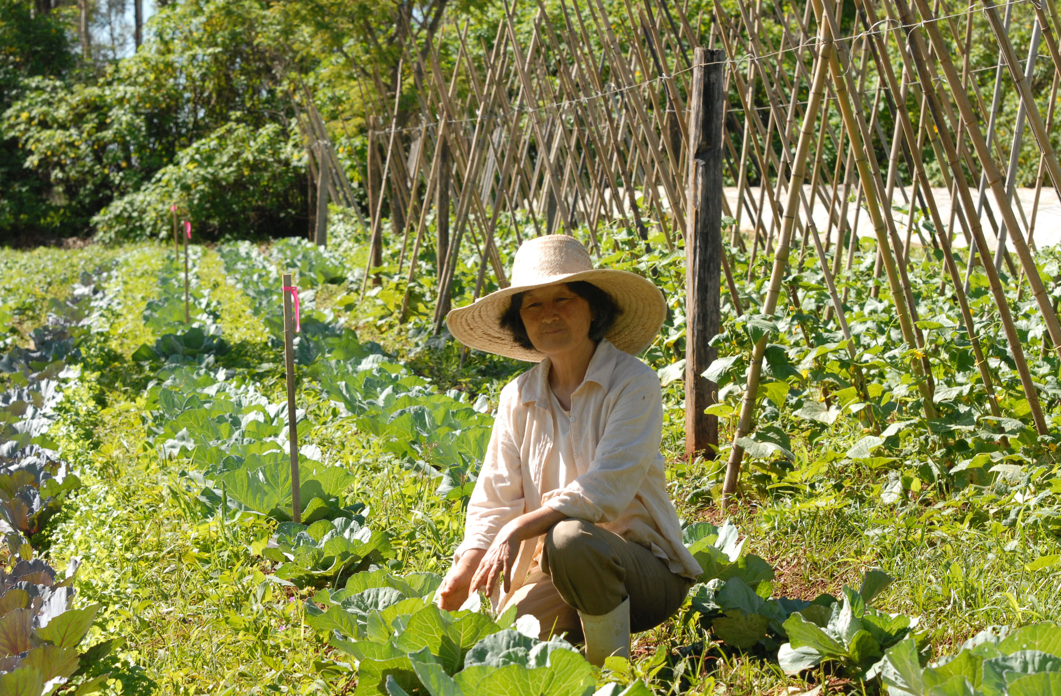 Taguatinga (DF) - Pioneira na agricultura orgânica no Distrito Federal, a produtora rural Massae Watanabe afirma que nos últimos anos a procura por alimentos produzidos sem agrotóxicos aumentou significativamente